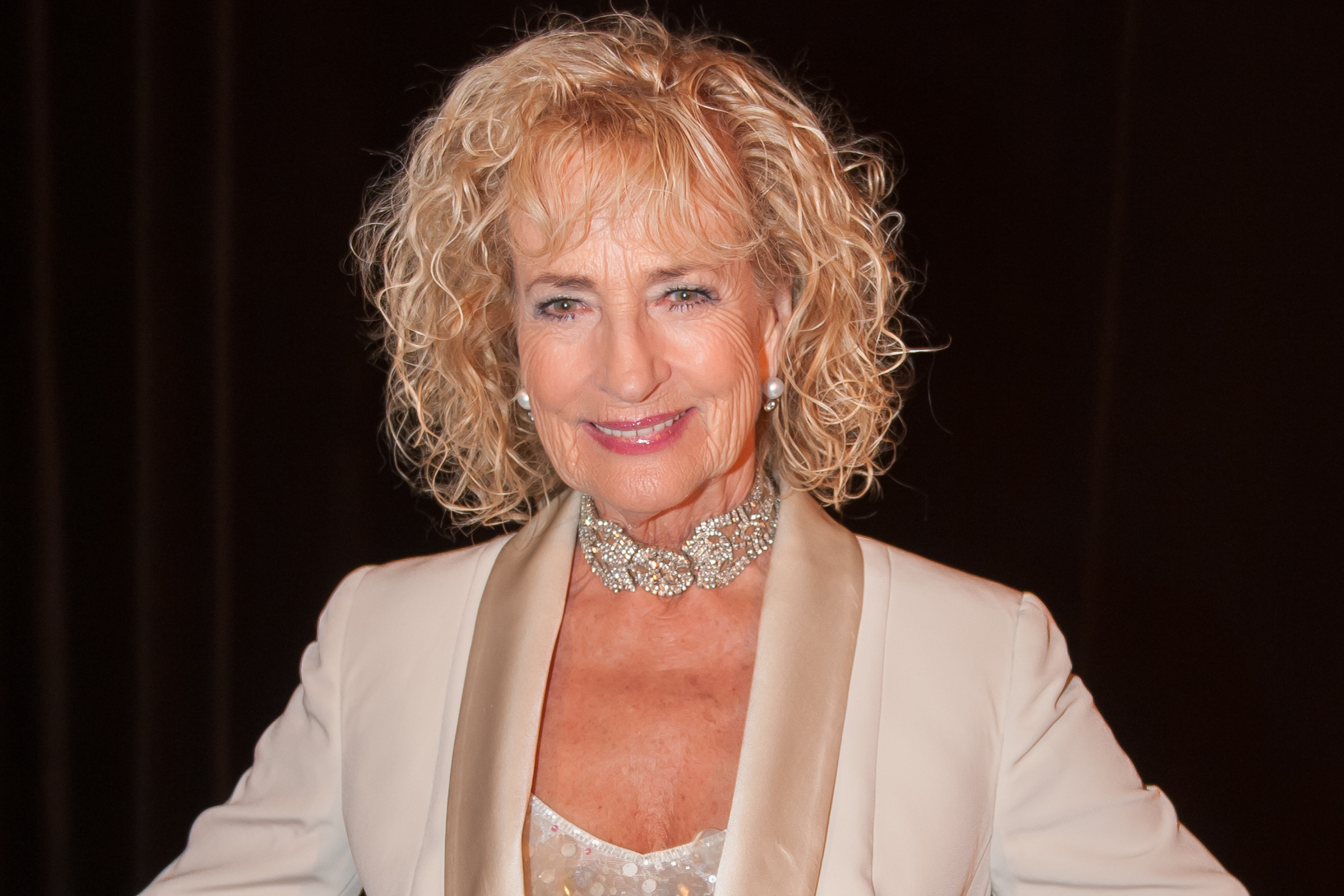 ORF Dancing Stars - Das Finale am 6. Mai 2016 im ORF-Zentrum Wien. Bild zeigt Dagmar Koller.